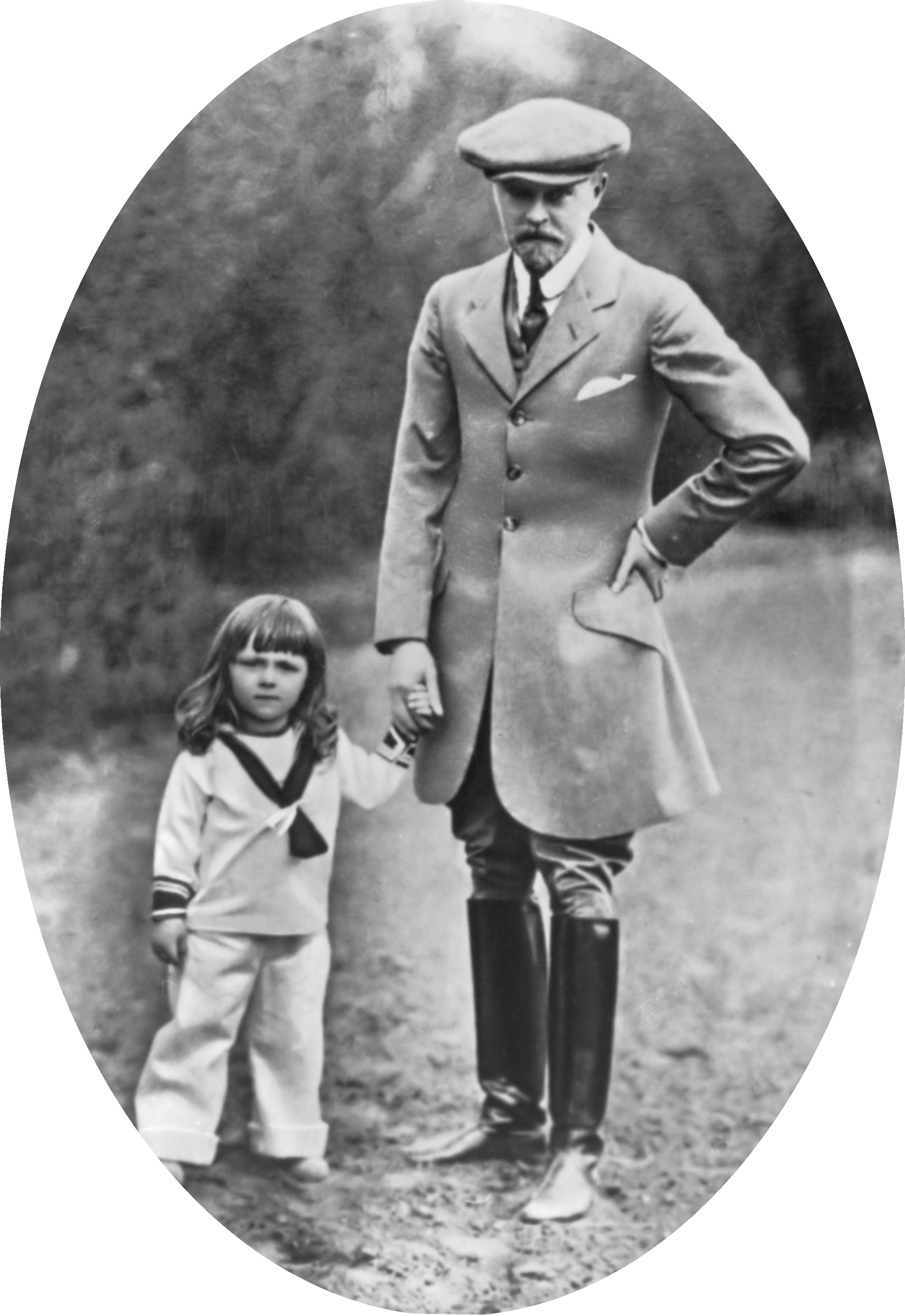 Prins Berhard, als kleuter, met zijn vader prins Bernhard von Lippe 1914